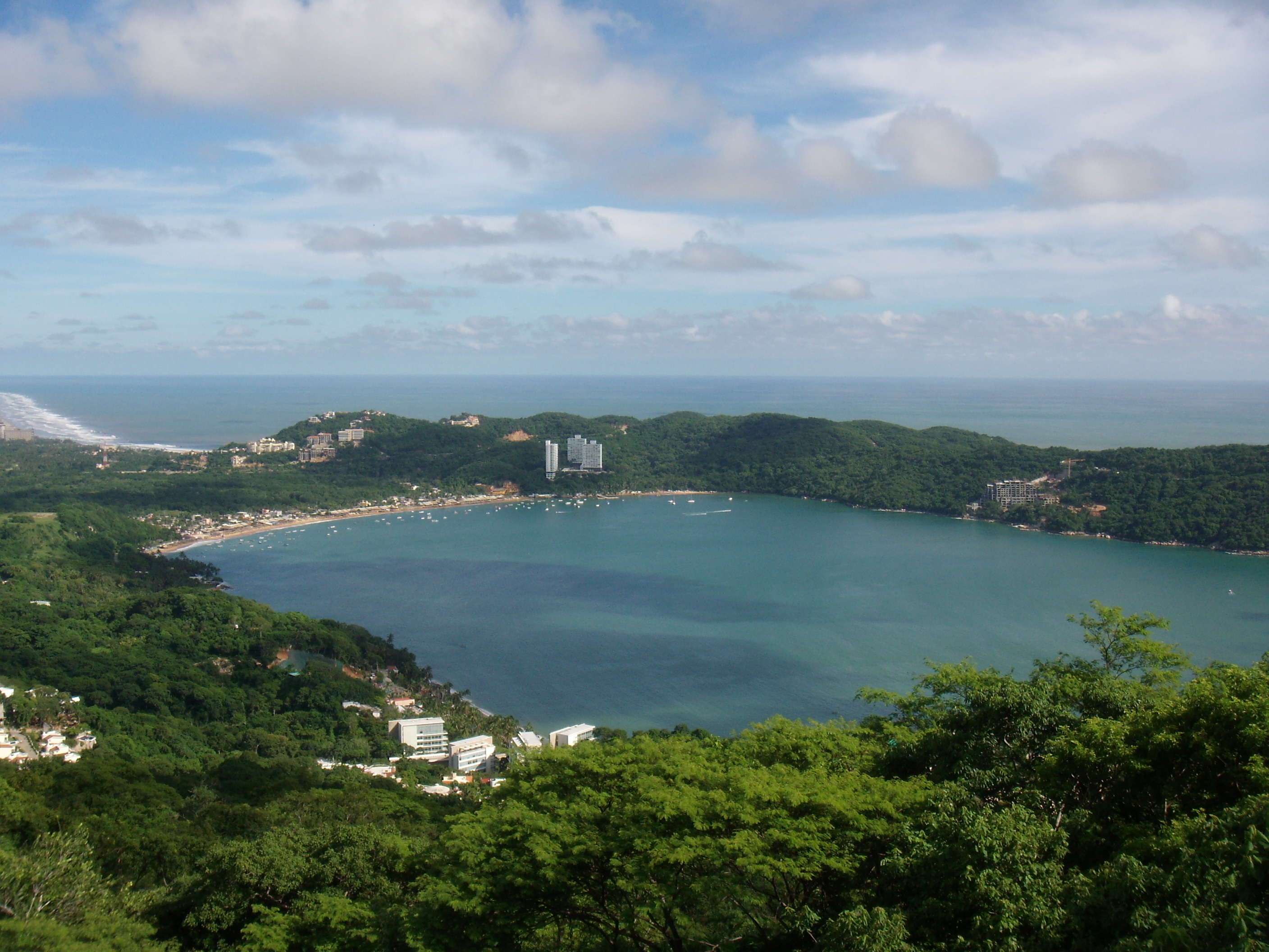 Bahía de Puerto Marqués desde la carretera Escenica en Acapulco, Guerrero, México